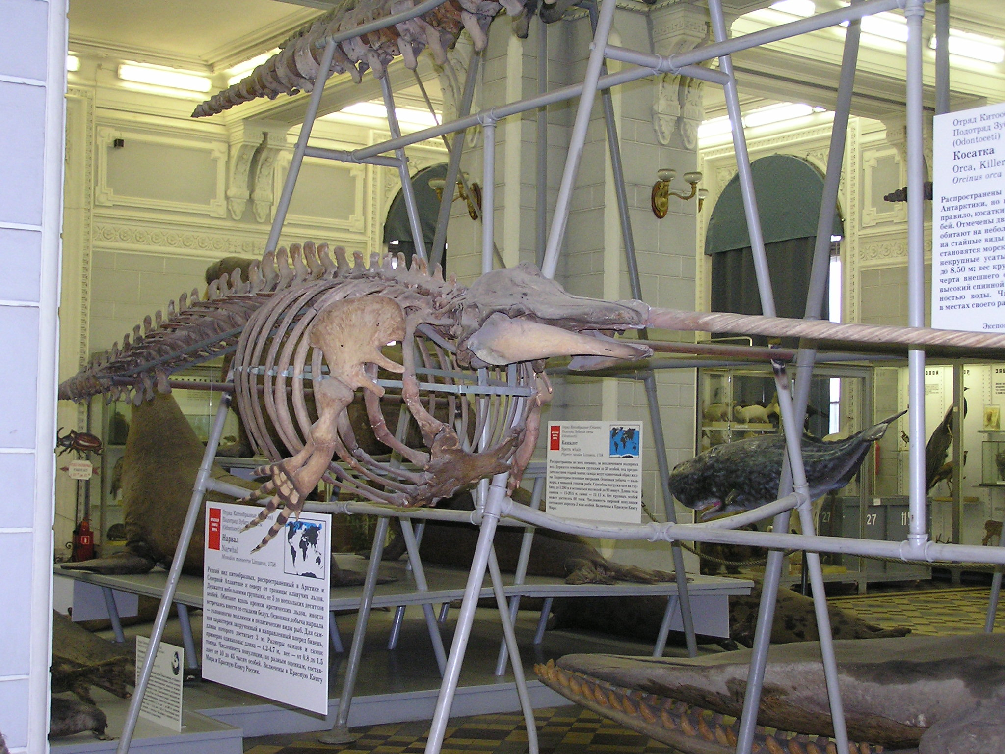 Зоологический музей в Санкт-Петербурге. Скелет нарвала